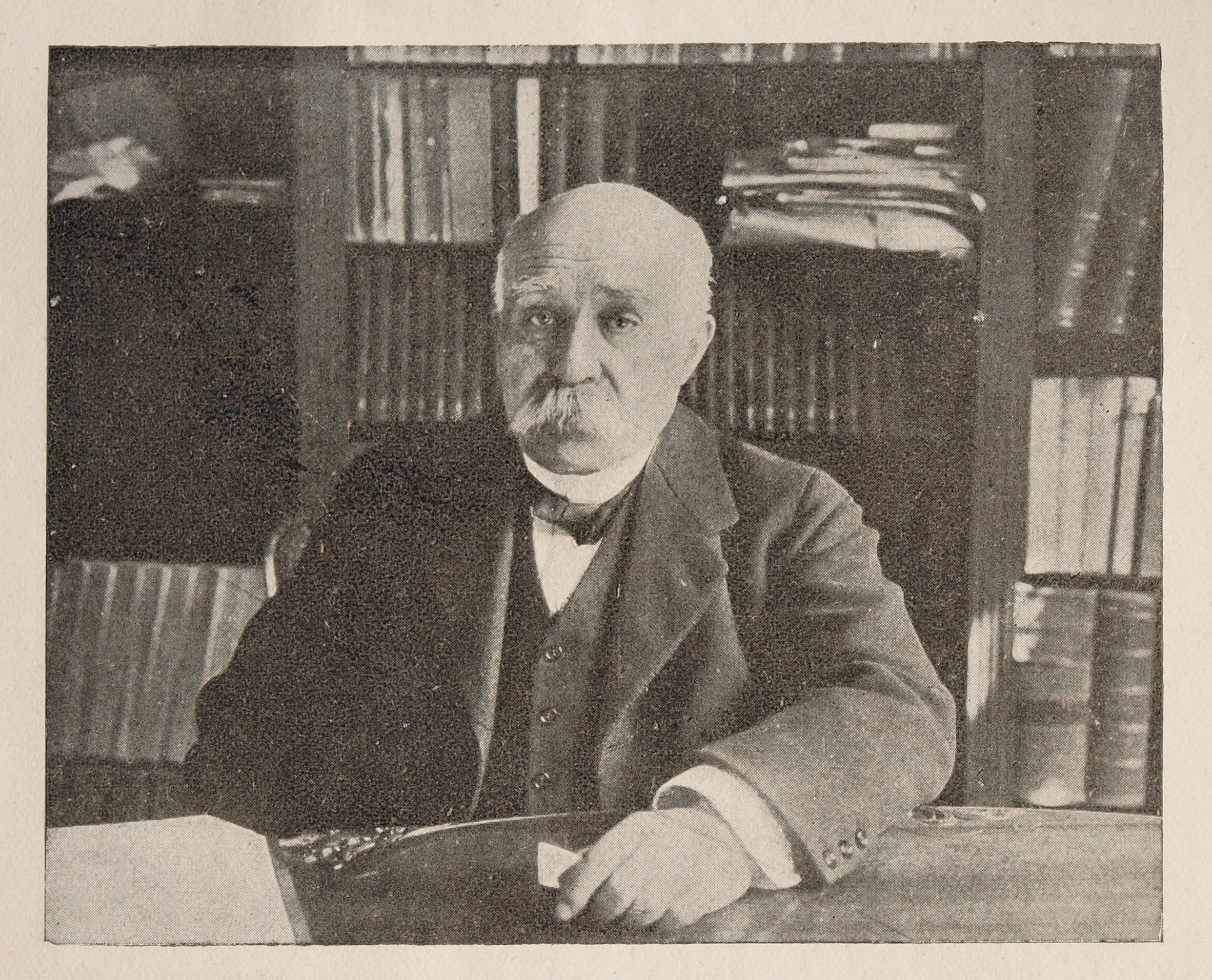 Georges Clémenceau à sa table de travail